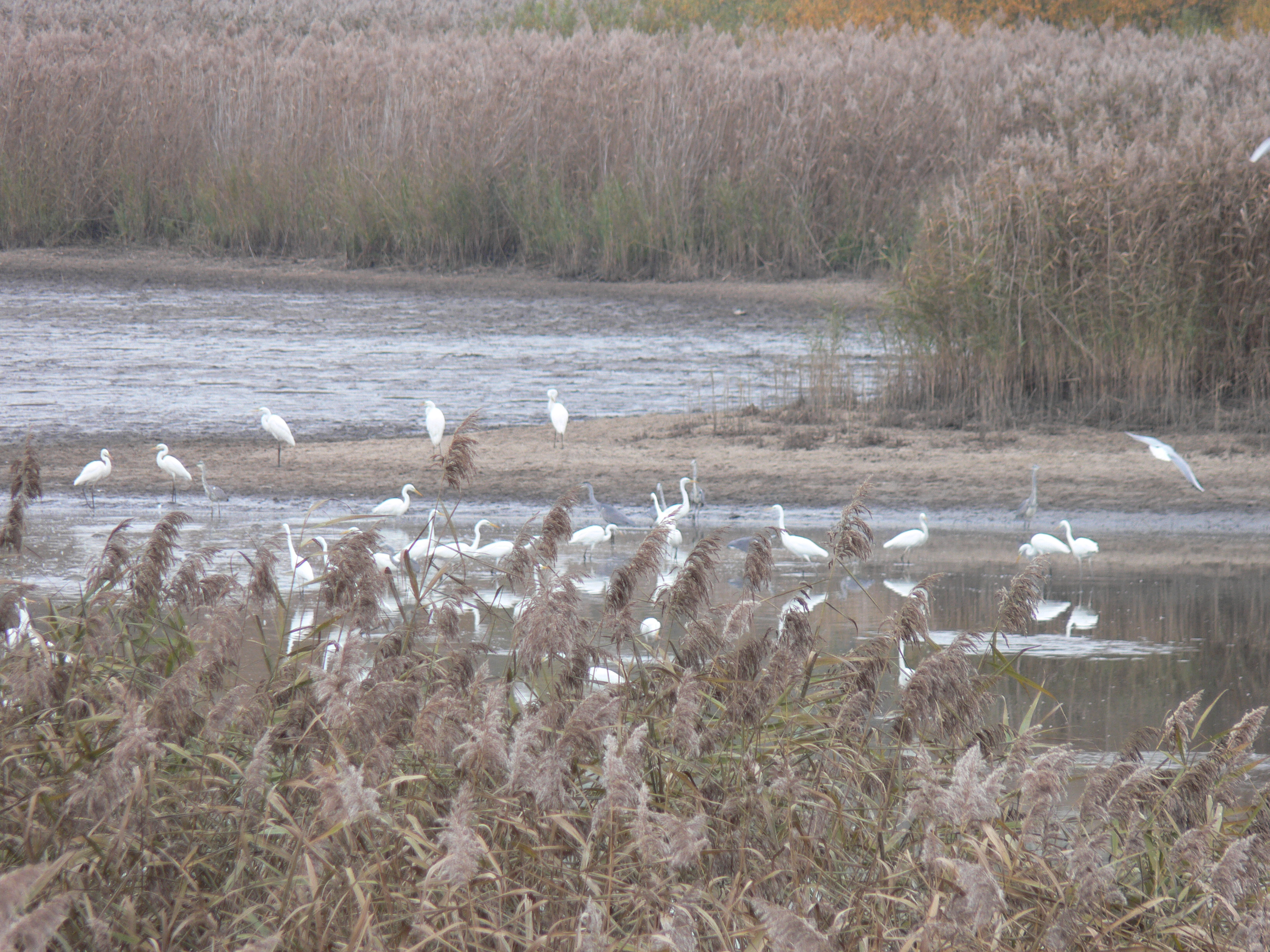 fotografie výlovů rybníka